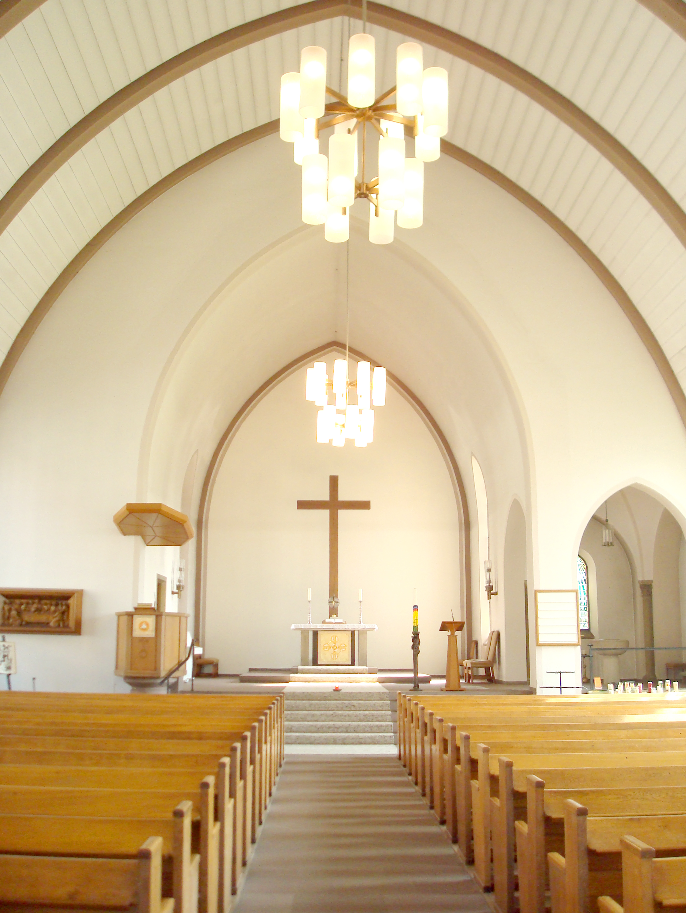 Innenraum der Apostelkirche in Gütersloh